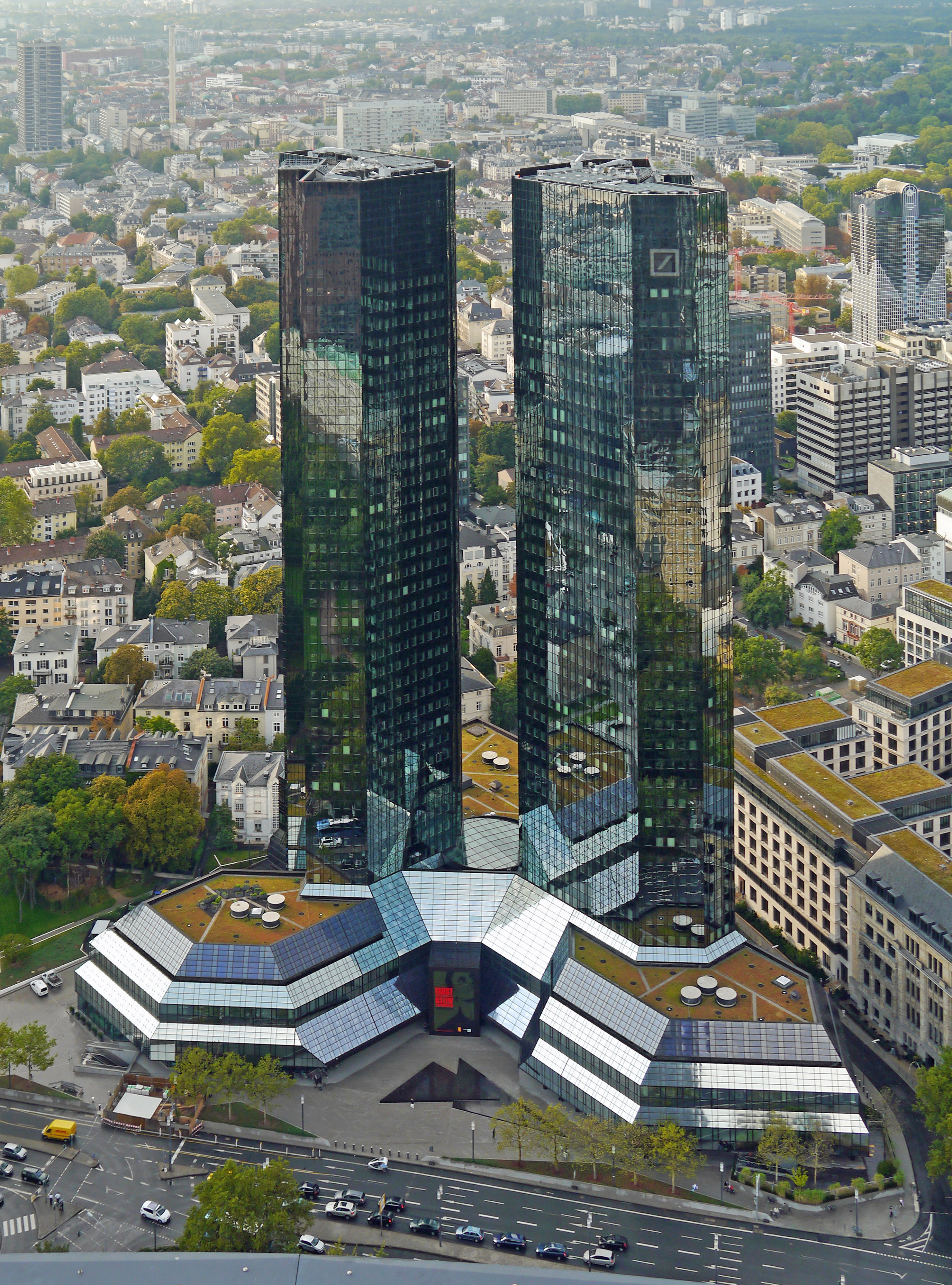 Deutsche Bank, Zentrale und Verwaltung an der Taunusanlage, 2012, Frankfurt-Innenstadt.